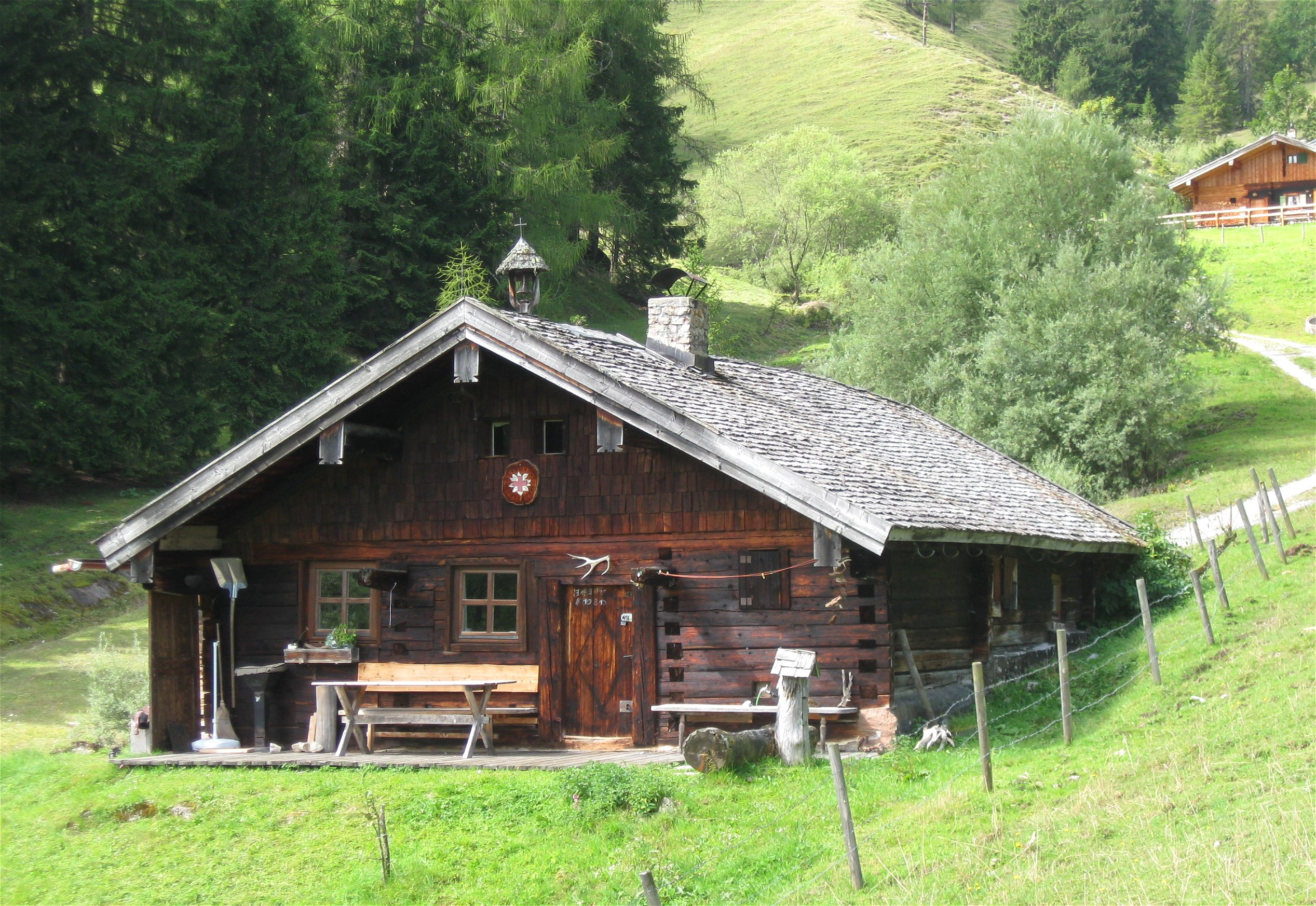 Oberaudorfer Alm. Alm, sog. Oberdörflerhütte, Holzbau auf Steinsockel mit Satteldach und teilweise Blockbau, 18./19. Jh.